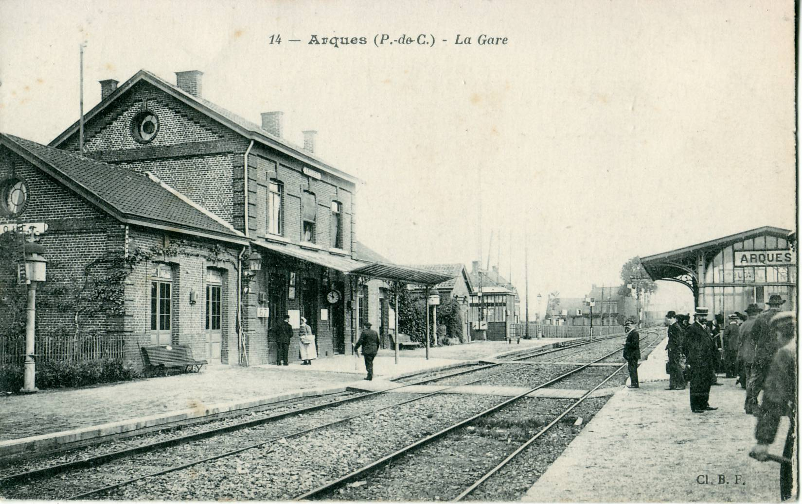 Carte postale ancienne éditée par B. F. n°14 ARQUES (P. de C.) : La Gare Gare sur la ligne de Saint-Omer à Boulogne